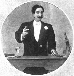 Fotografía de Frey Volt, muñeco autómata del ventrílocuo español Francisco Sanz Baldovi